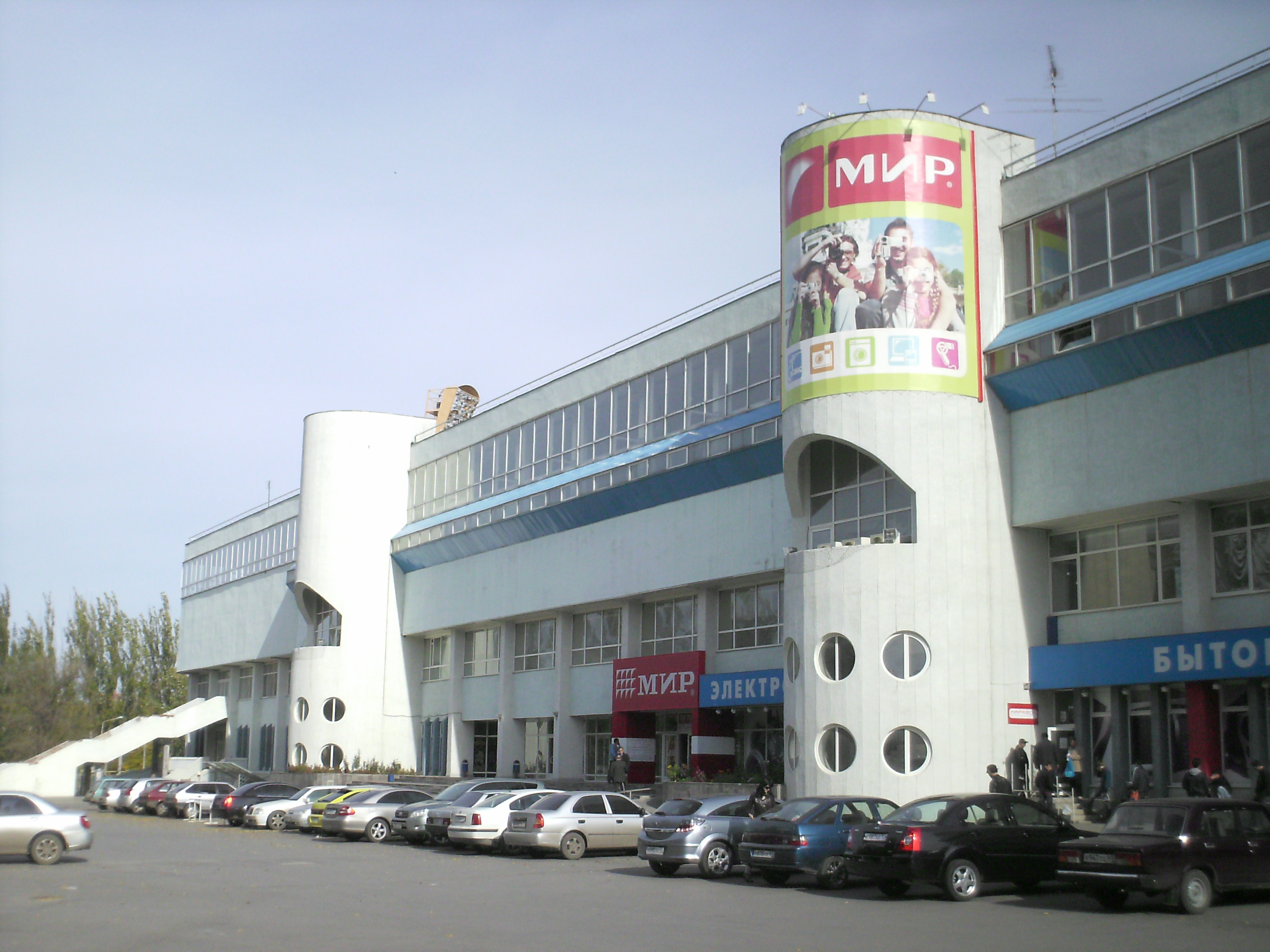 Ростов на Дону